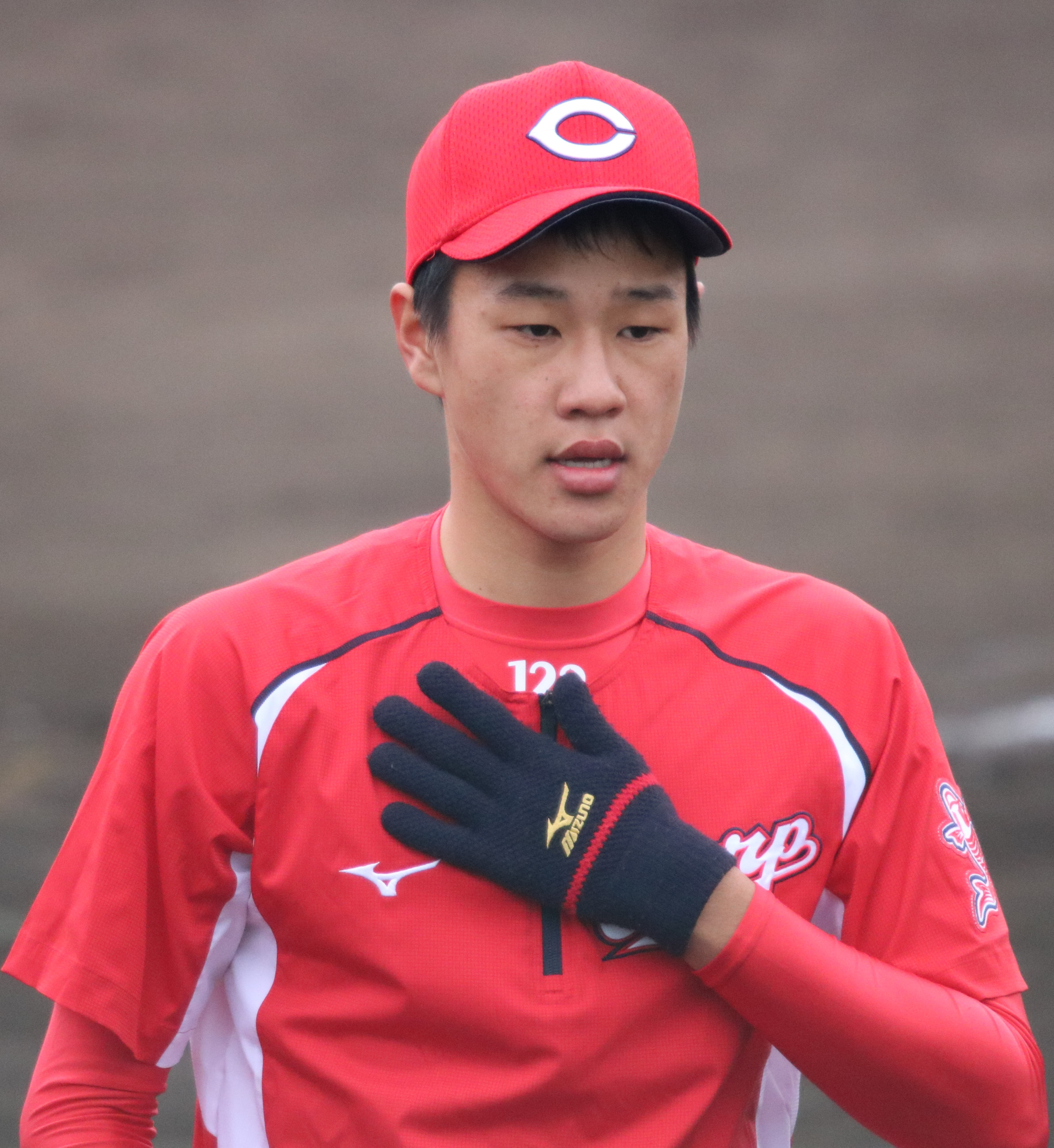 2018/2/8 東光寺球場